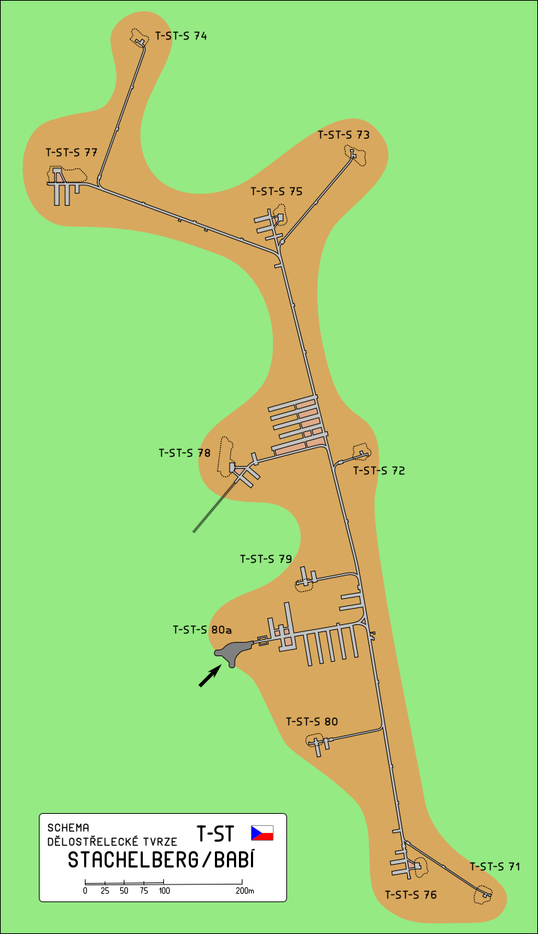 Česky: CS - Stachelberg, mapa podzemí